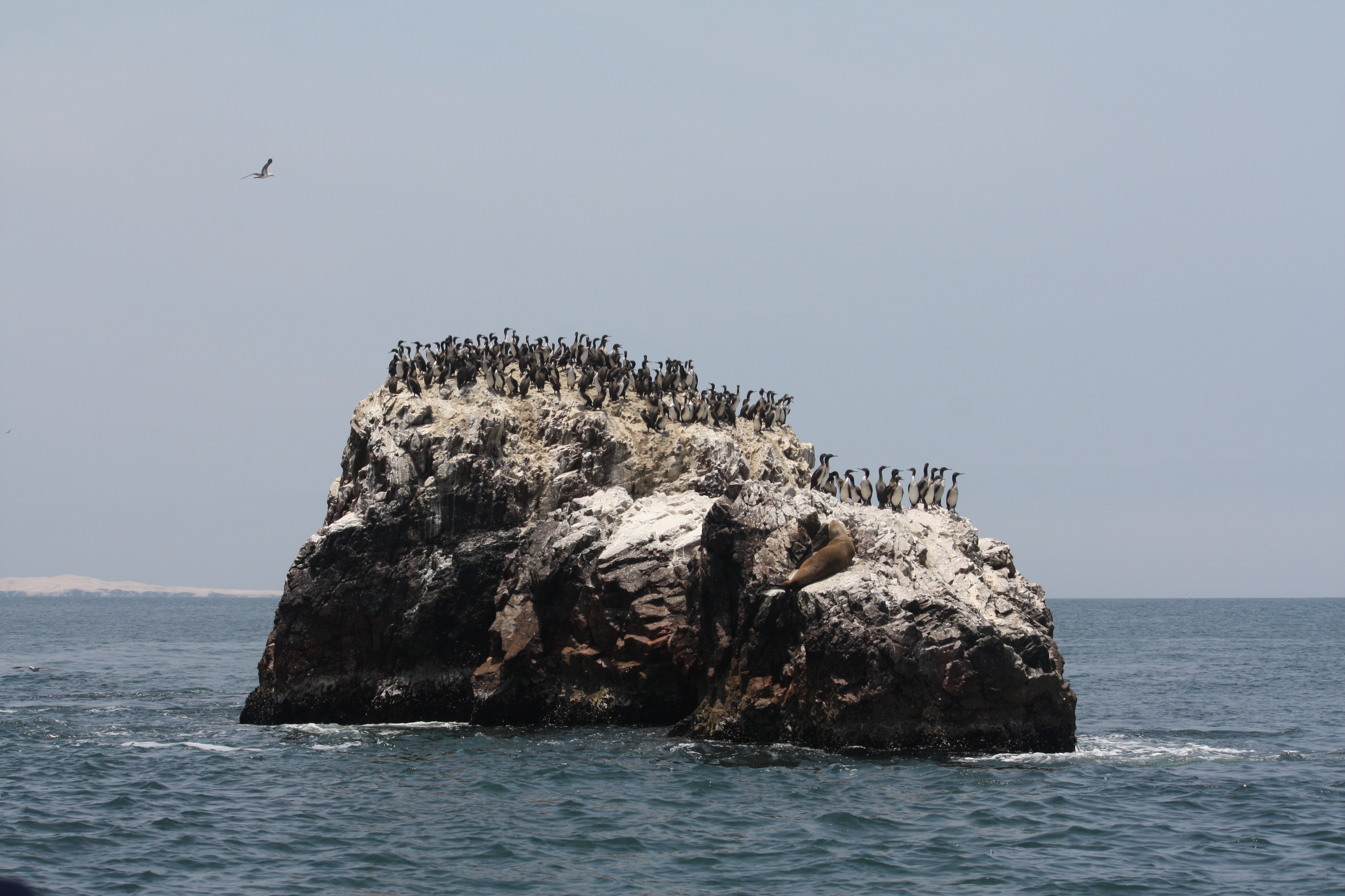 Guanay Cormorants Leucocarbo bougainvillii, Islas Ballestas, Paracas, Peru